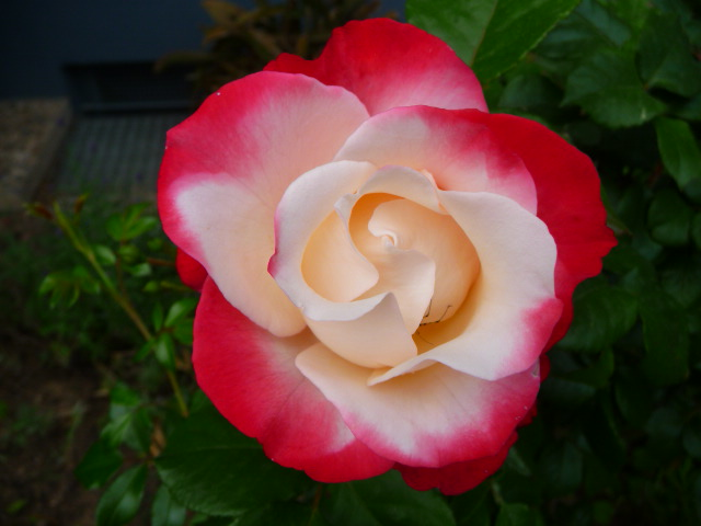 Geöffnete Rose "Nostalgie", Tee-Hybride (Tantau 1995)